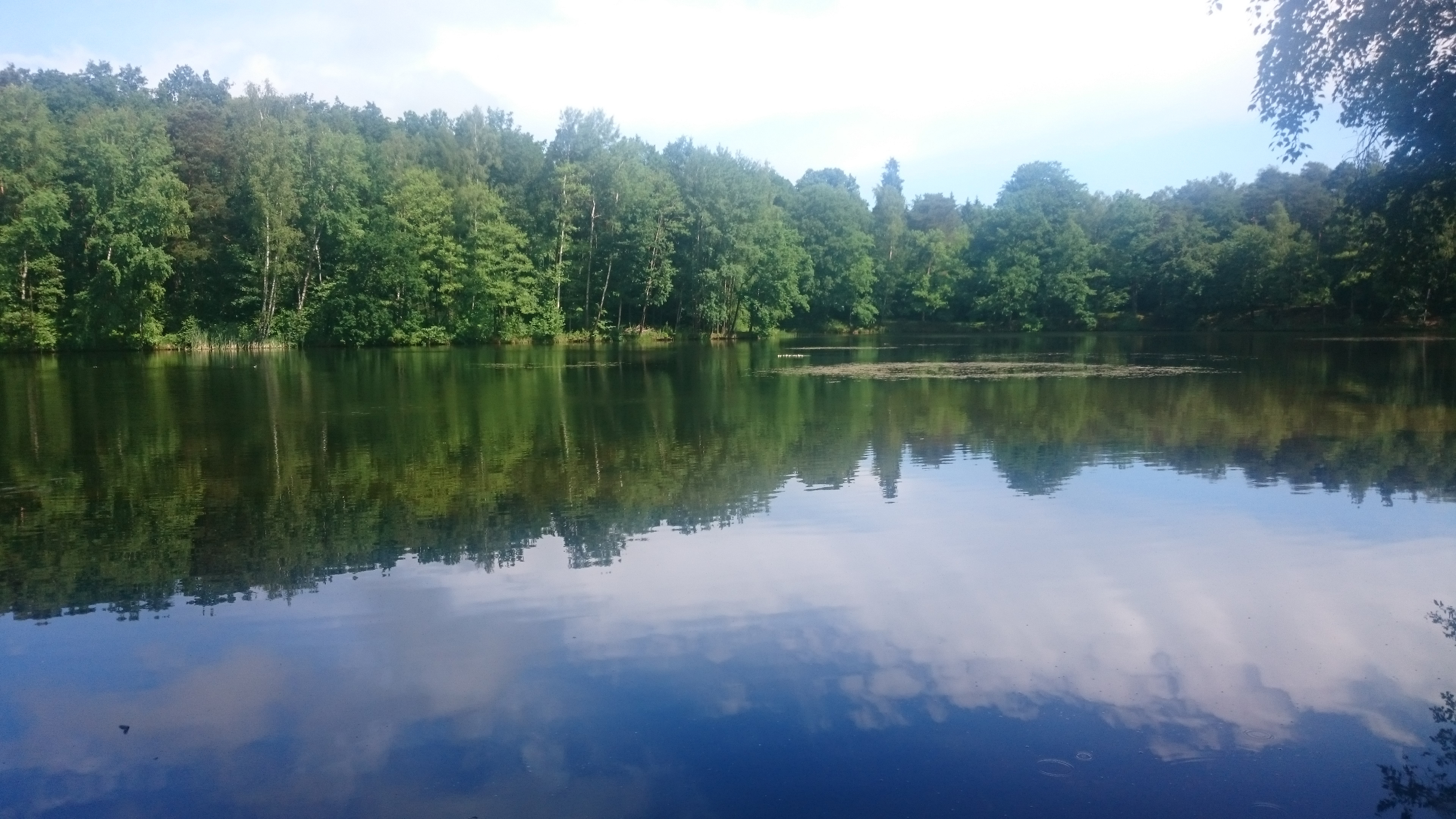 Der Altteich bei Hohnbach, im Naturschutzgebiet "Kohlbachtal"